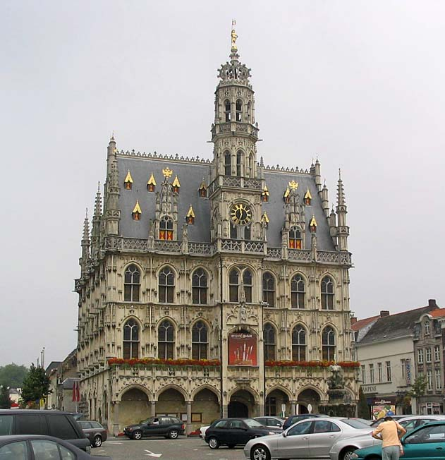 Town Hall of Oudenaarde, Belgium